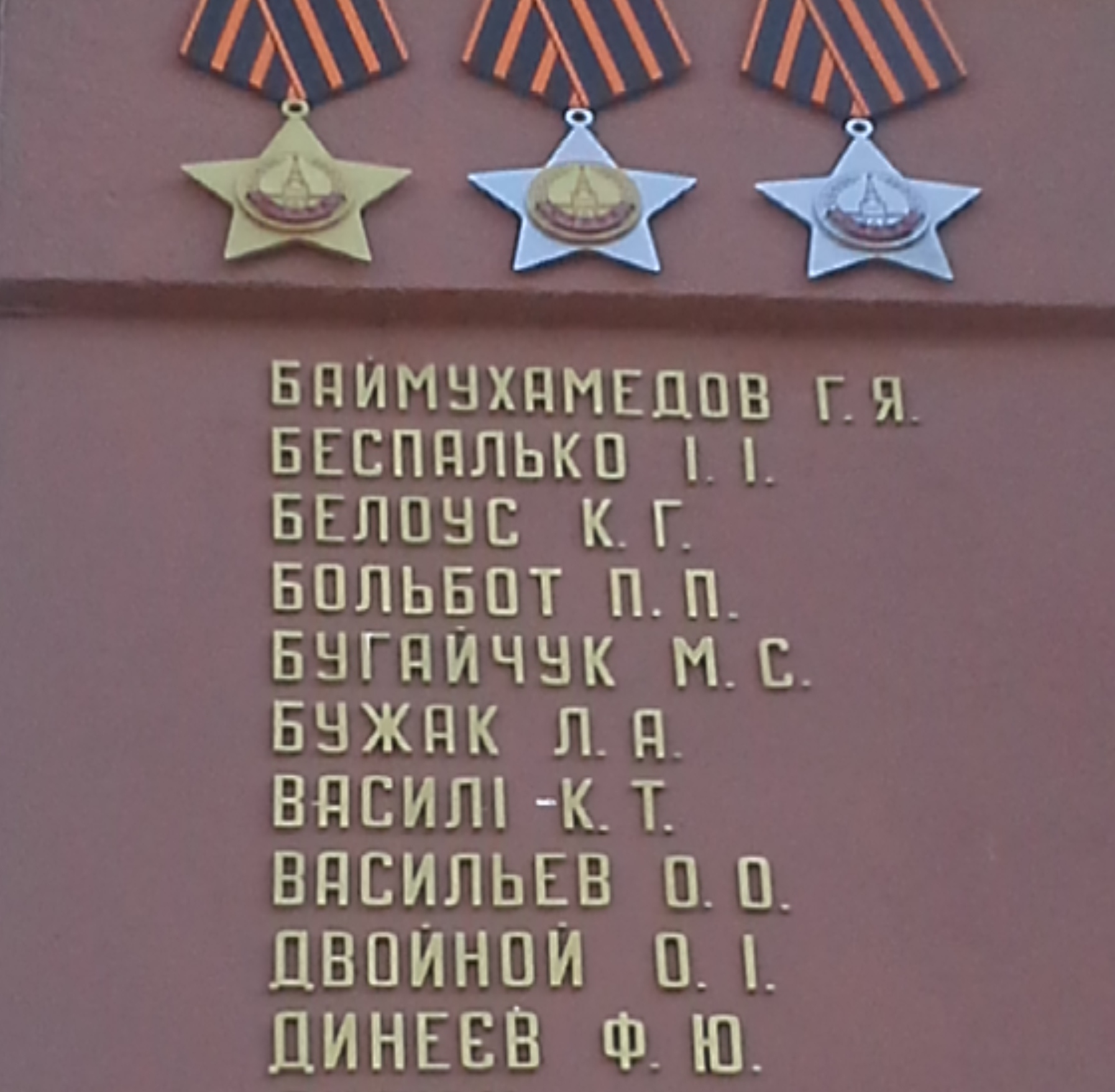 Имея Ф. Динеева на Доске почета в честь полных кавалеров ордена Славы